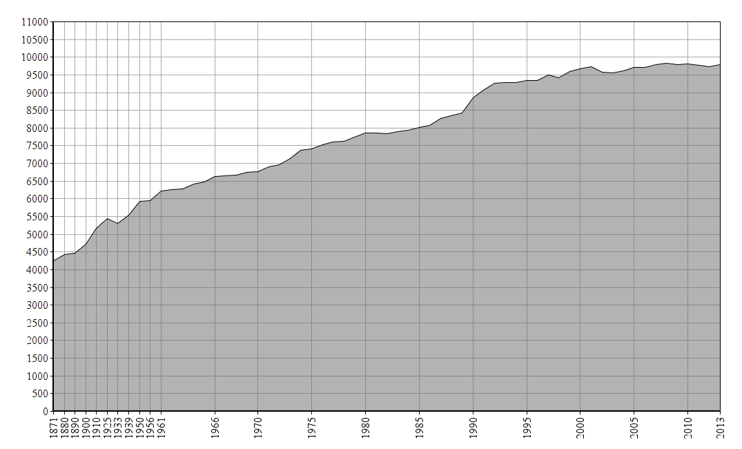 Dieses Bild zeigt die Bevölkerungsstatistik von Appenweier